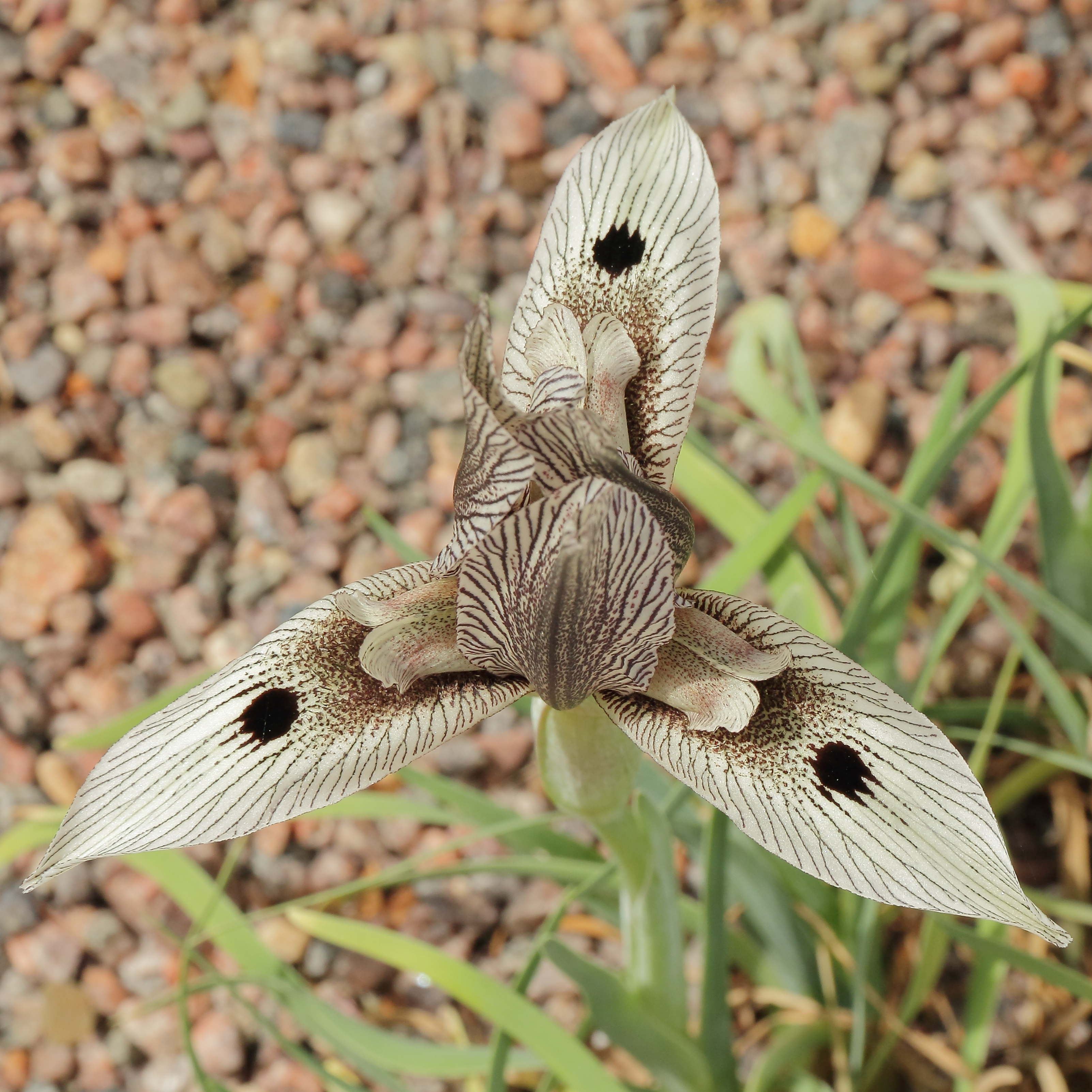 Iris helena i Göteborgs Botaniska Trädgård.